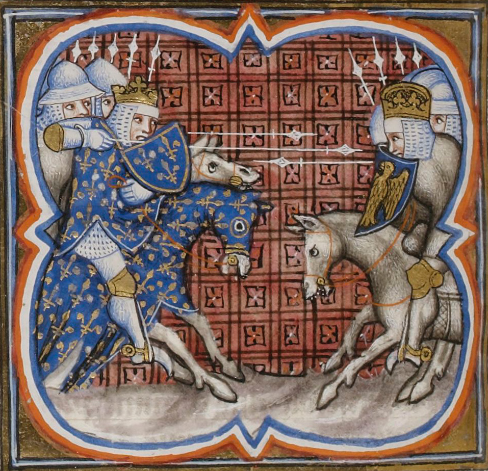 Bataille de Bouvines entre Philippe Auguste et l'empereur Otton IV (1214). Grandes Chroniques de France, XIVe siècle. Paris, Bibliothèque Nationale de France, Département des manuscrits, Français 2813, folio 253 verso.